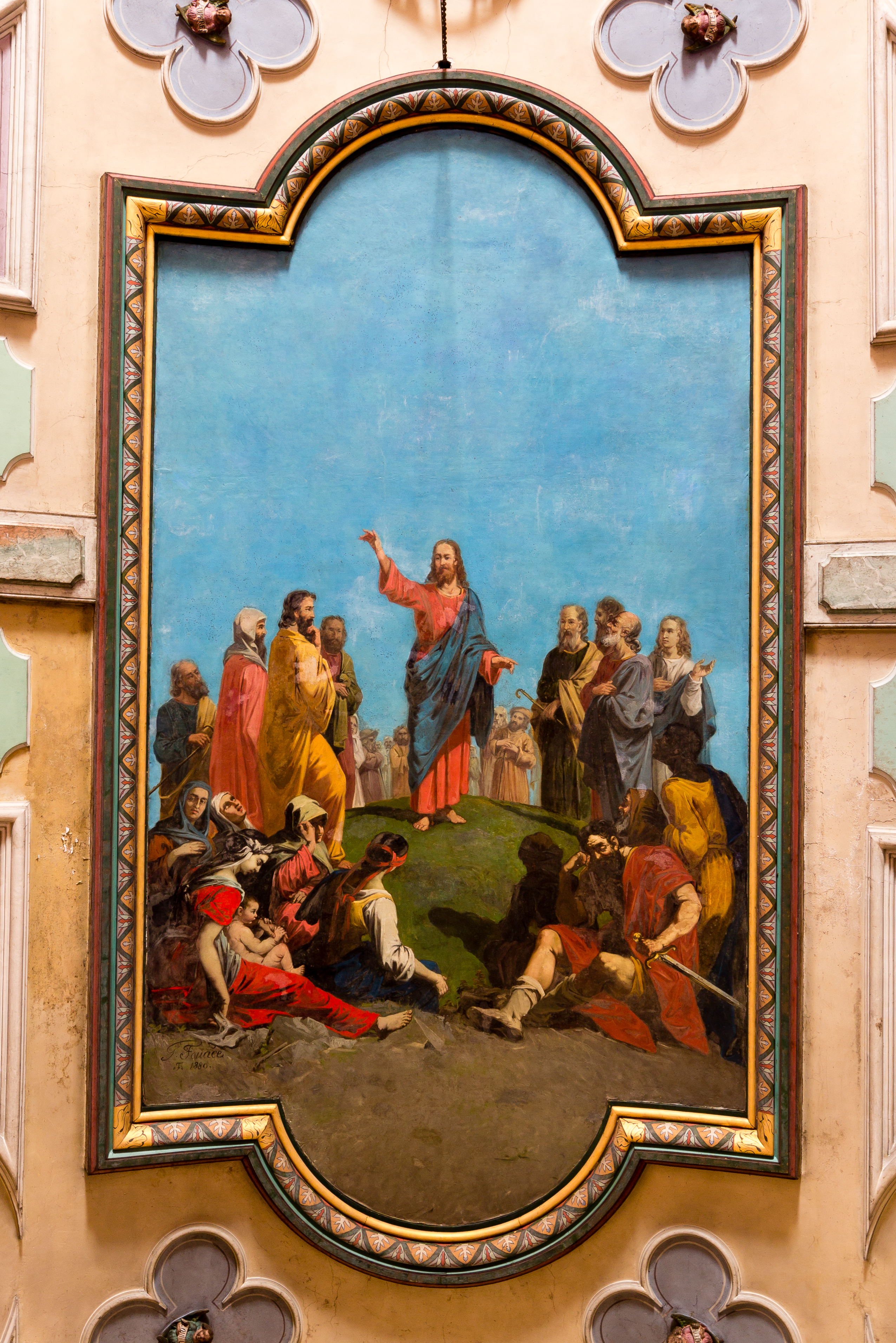 Le sermon sur la montagne par Guillaume Fouace, au plafond de de l'église Notre-Dame de Montfarville (France).